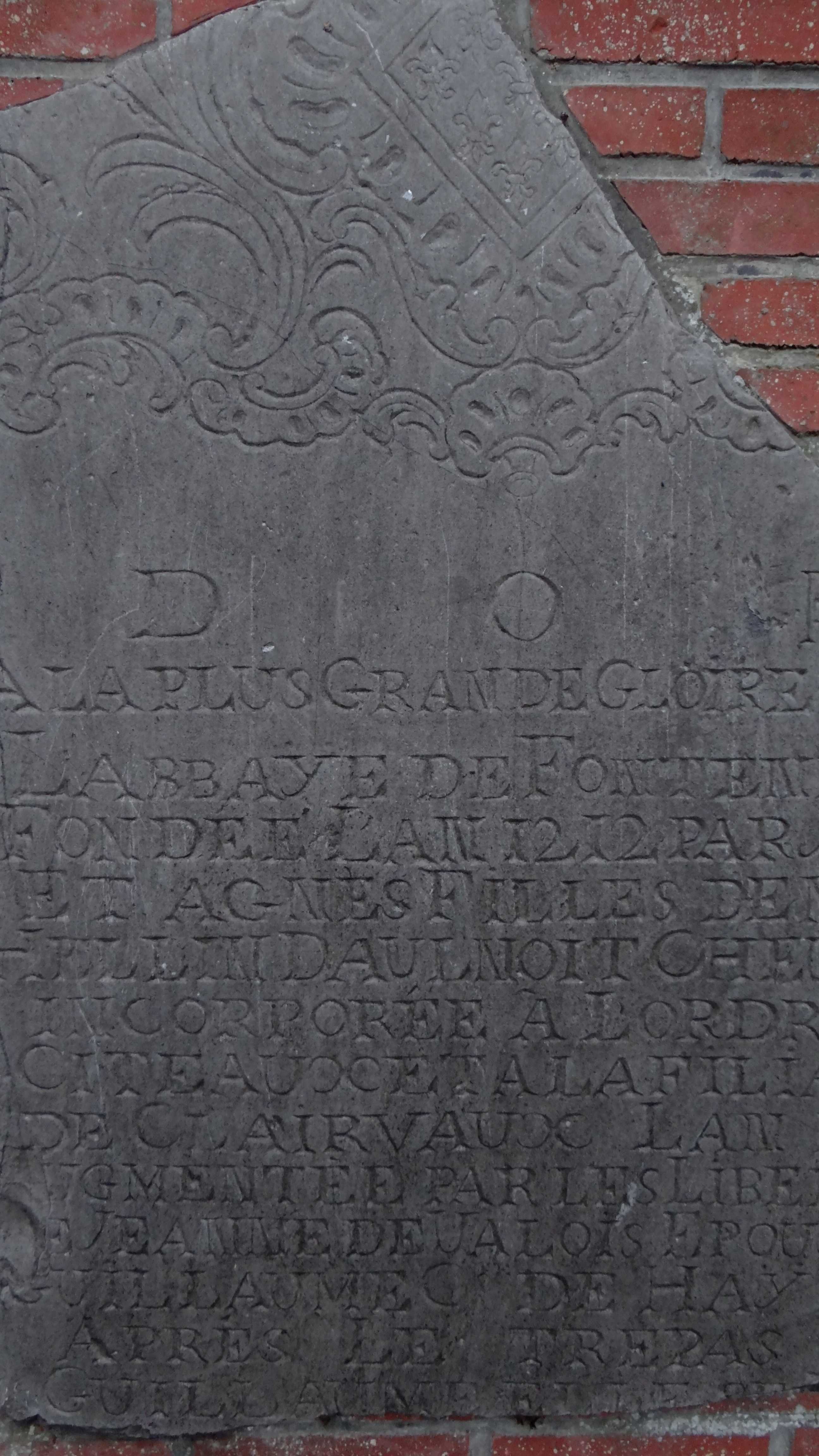 Maing - Parc archéologique de l'abbaye de Fontelle